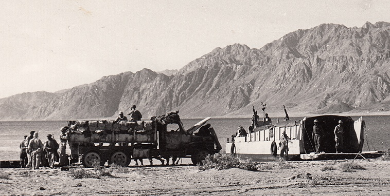 נחתת מביאה מים ודלק לחטיבה 9 במפרץ דהב